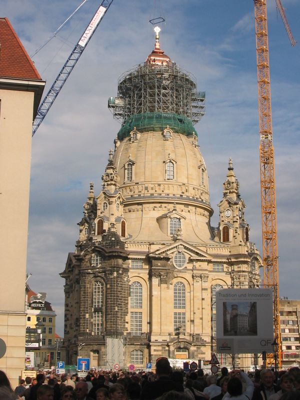 Die Frauenkirche Dresden am 22.06.2004 mit frisch aufgesetzter Haube.